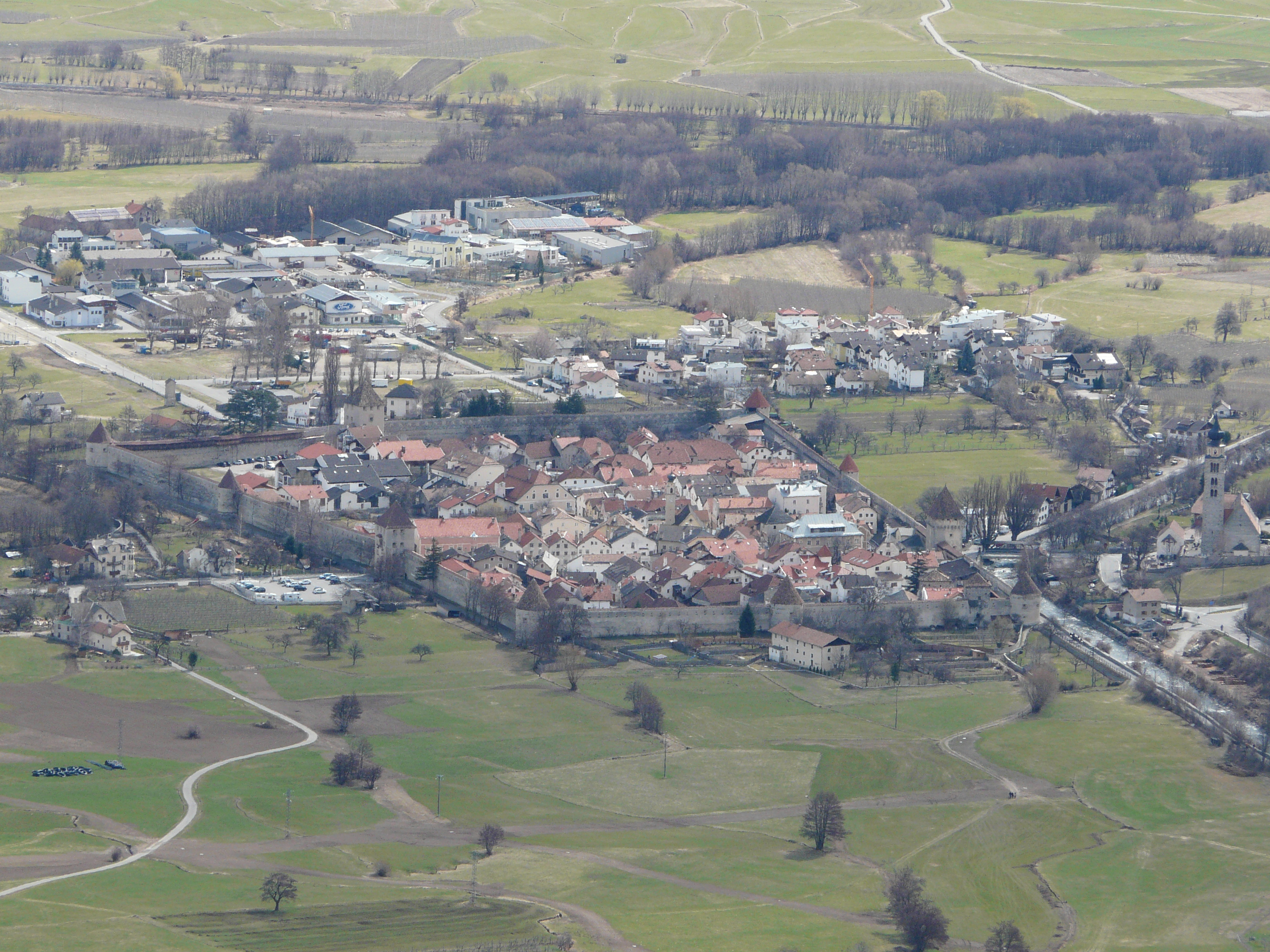 Glurns (Blick vom Verschleiberg)